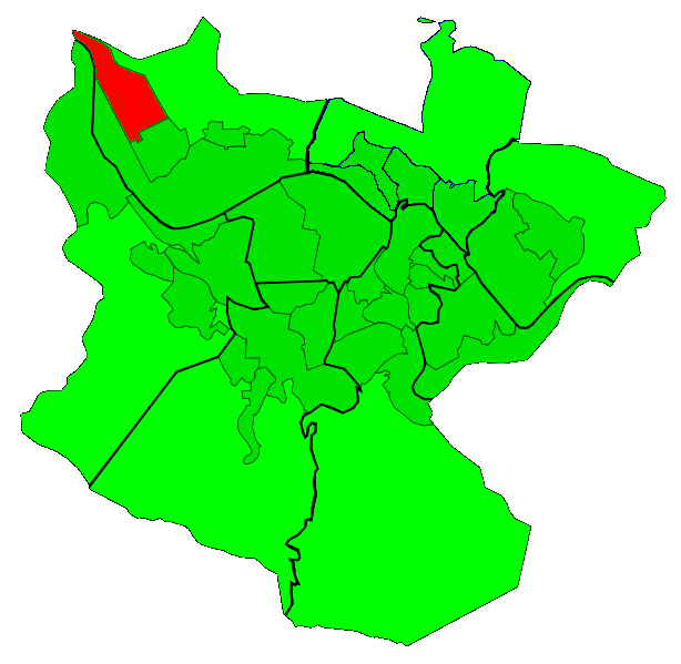 San Ignazio-Elorrietako auzoa.